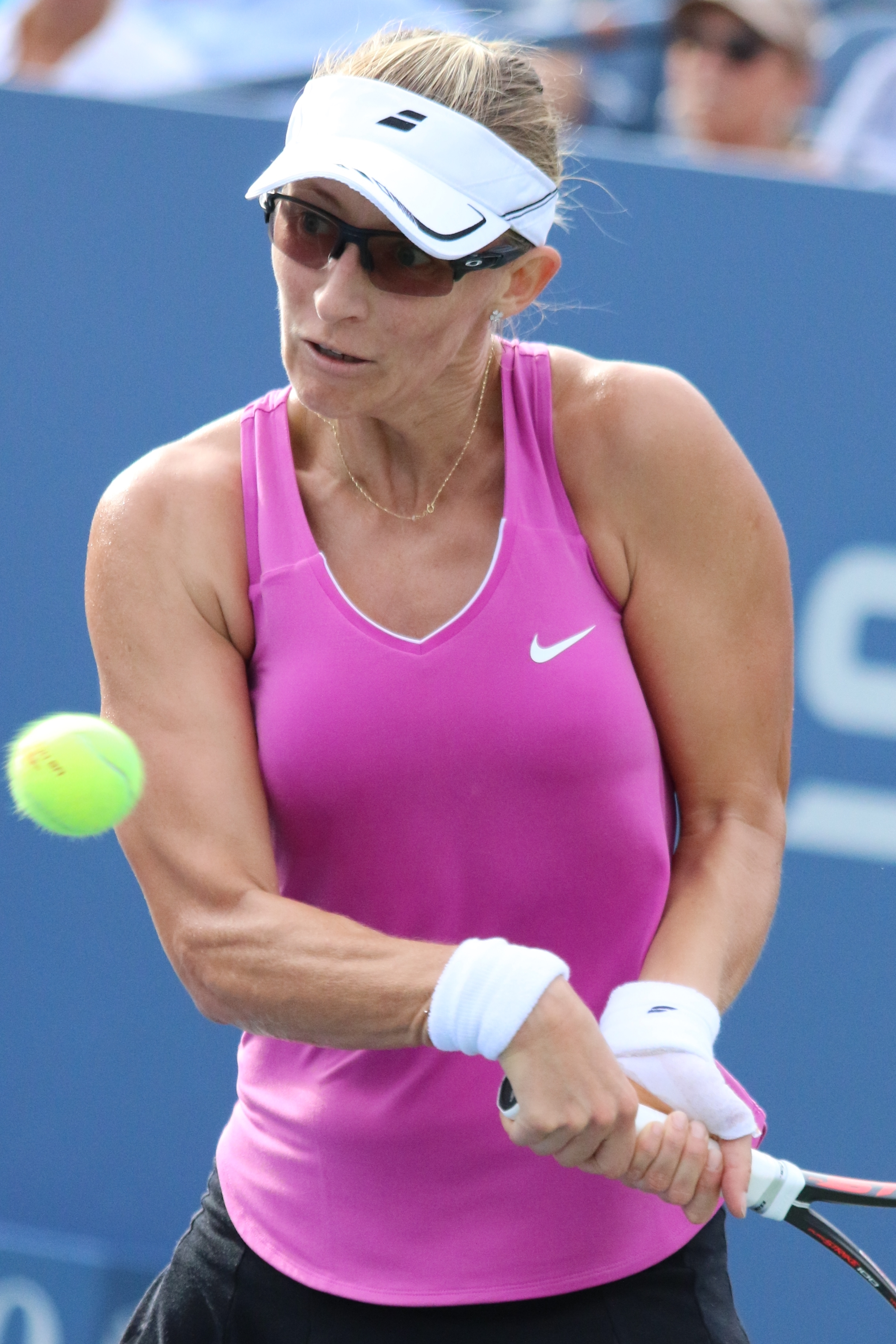 Lucic Baroni US16 (26)